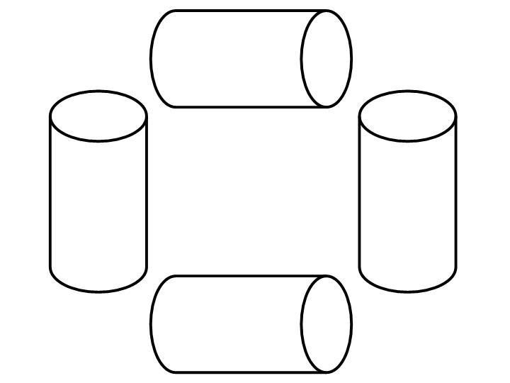 Tubos que representan agujeros de gusano.